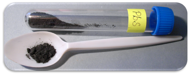 Sulfid olovnatý - PbS